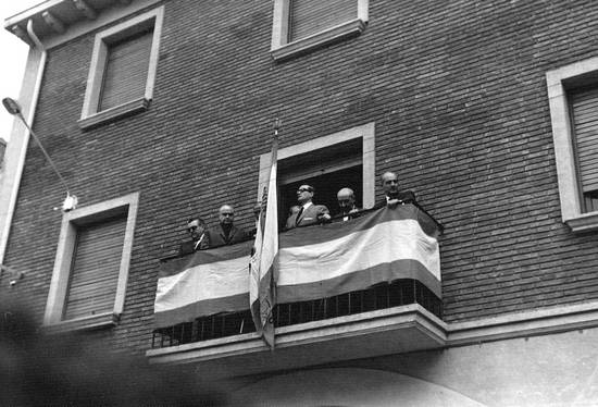 Inauguración del nuevo Ayuntamiento, el 20 de julio de 1965.